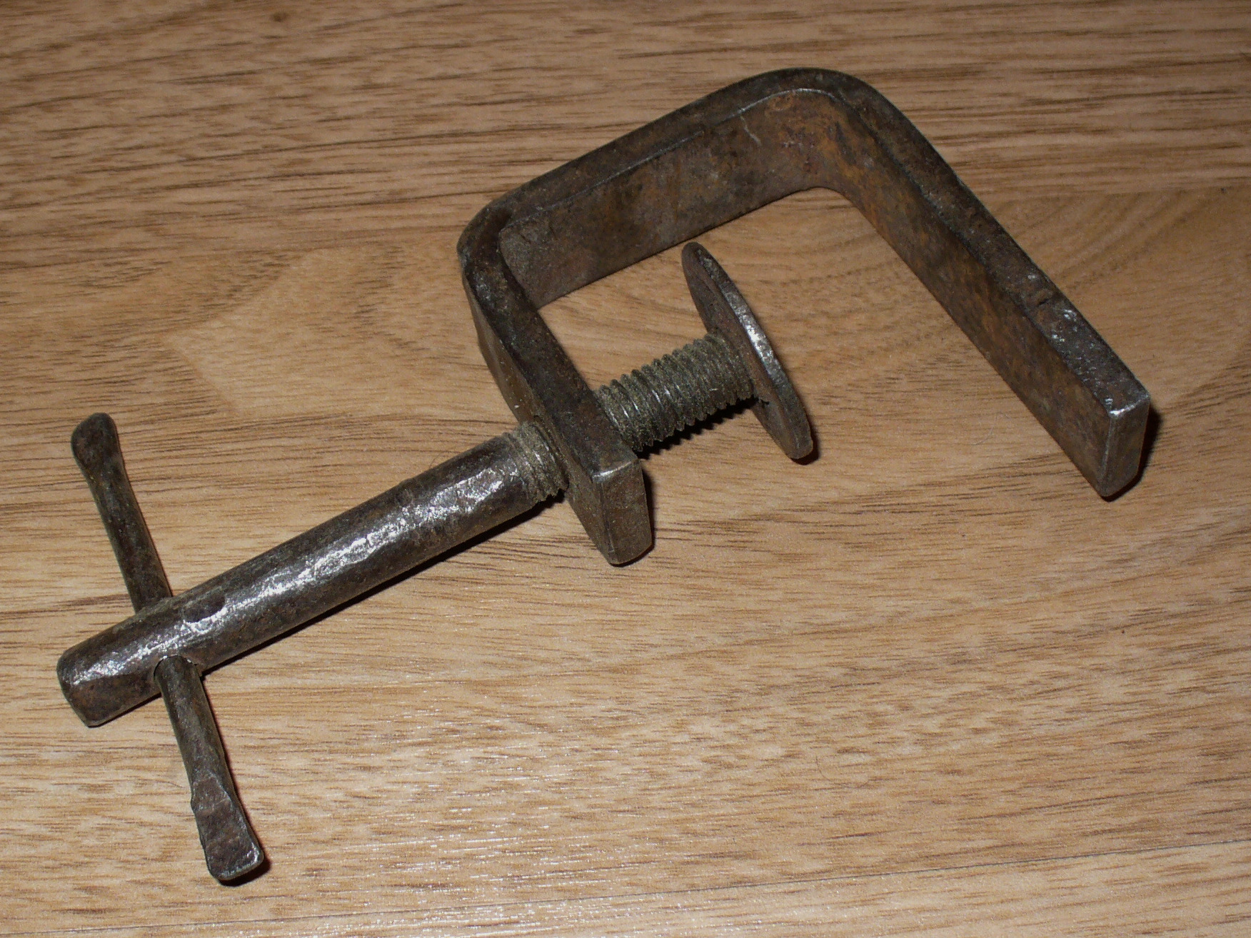 Металлическая самодельная струбцина